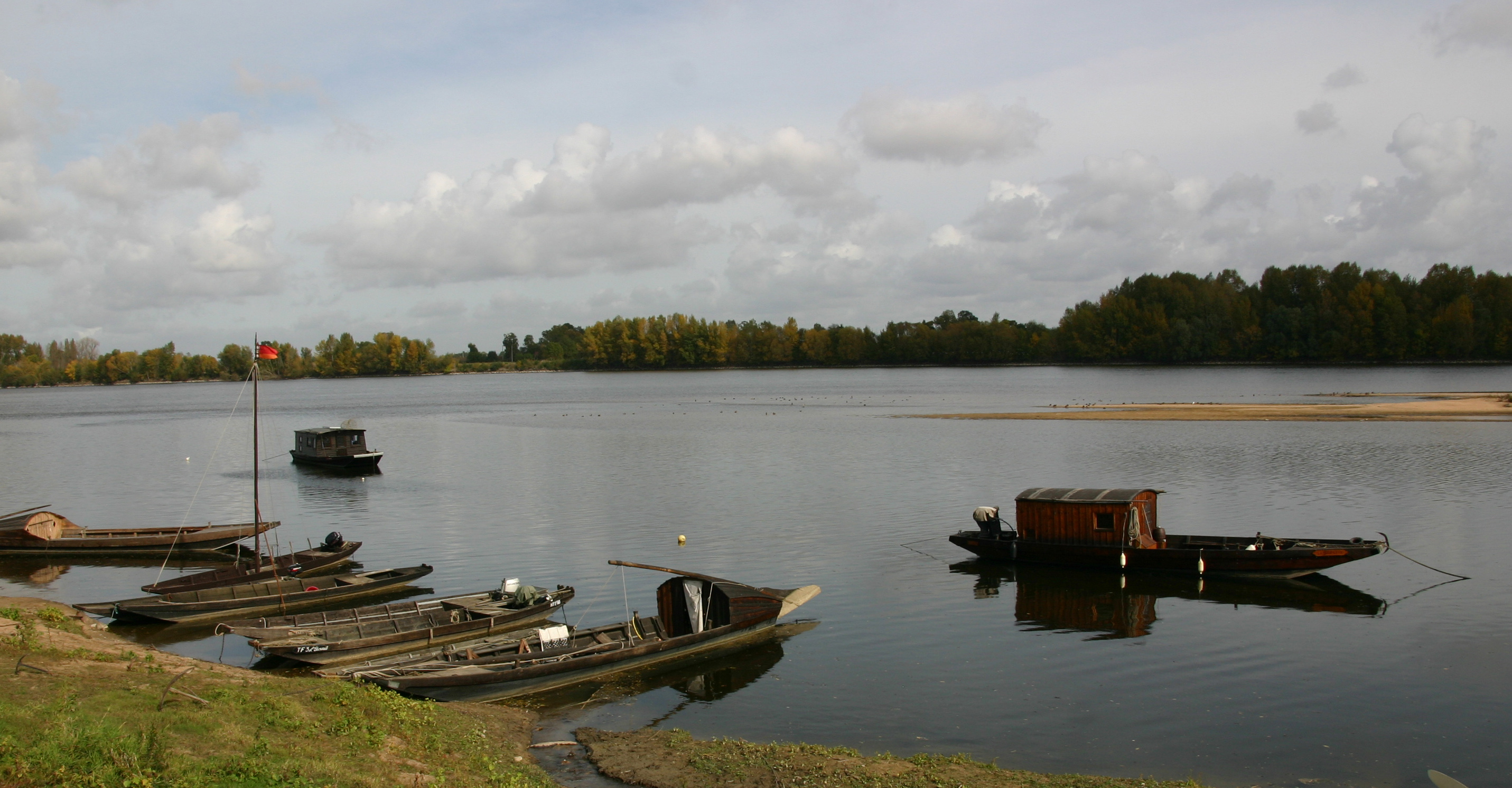 Loire bei Le Thoureil